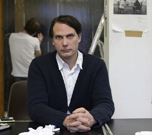 Foto: Luise Müller-Hofstede